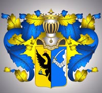 Герб Игнатьевых